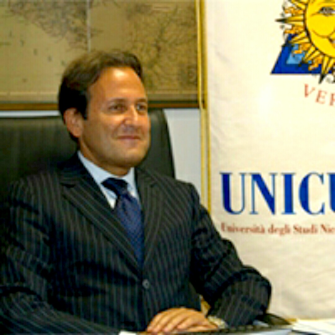 Fabio Fortuna, economista, docente e rettore dell'Università degli Studi Niccolò Cusano.